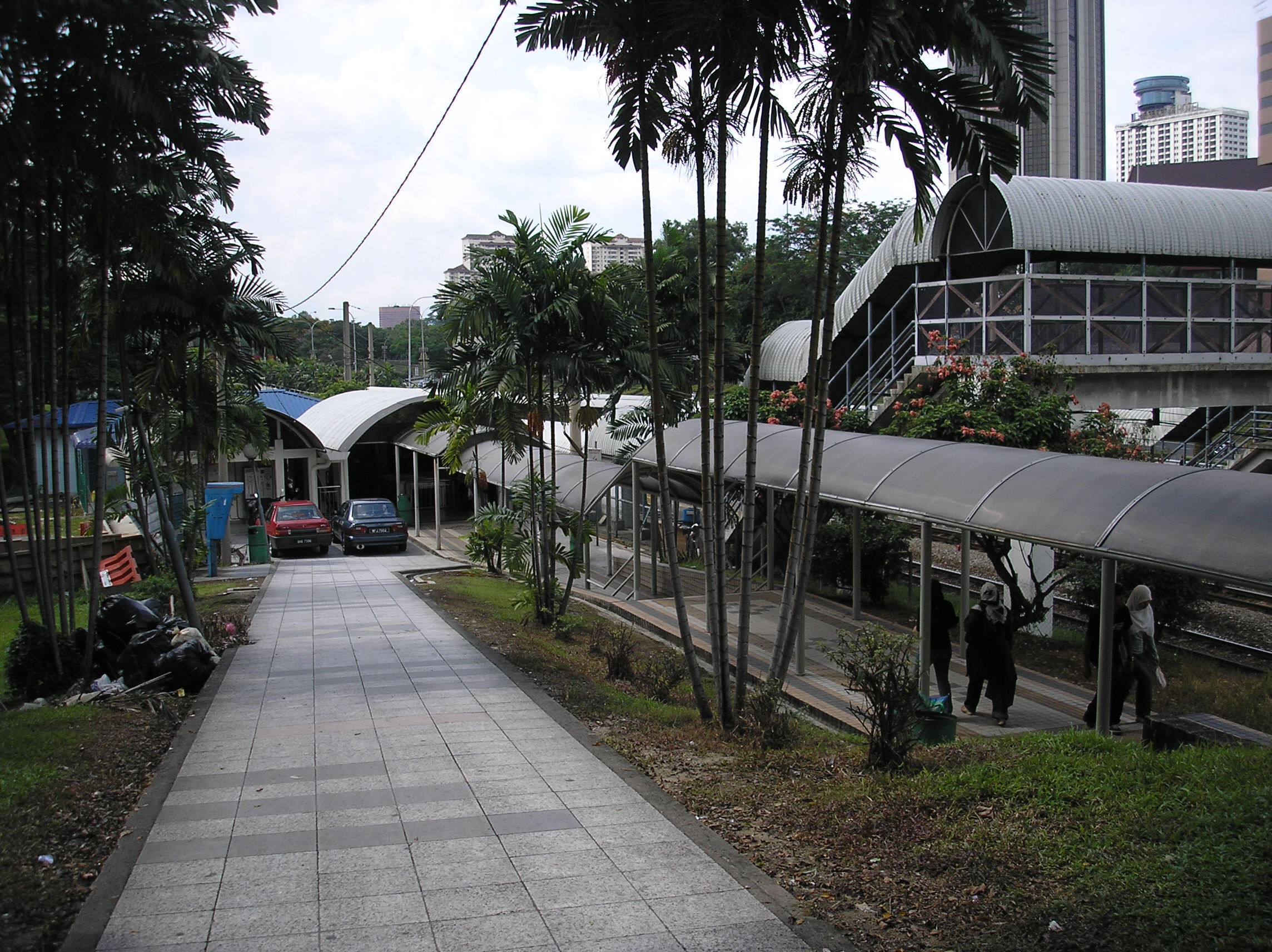 The Putra station (Rawang-Seremban/Sentul-Port Klang) (exterior), Kuala Lumpur, Malaysia.